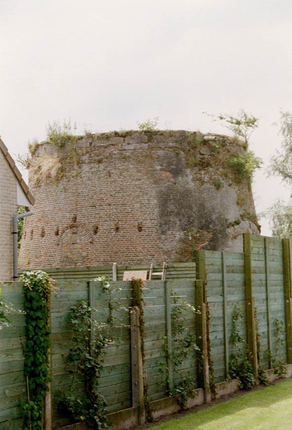 Maldegem Dinantstraat 10